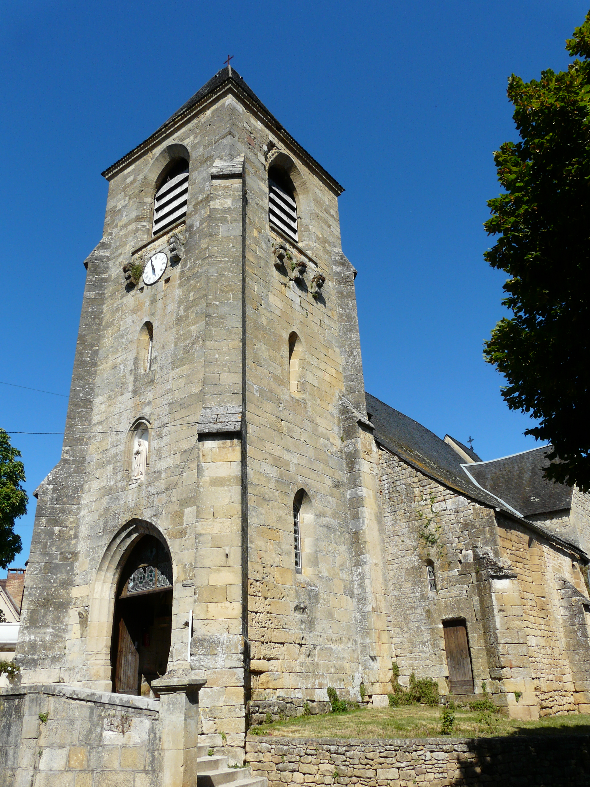 L'église Saint-Julien vue du sud-ouest, Saint-Julien-de-Lampon, Dordogne, France.